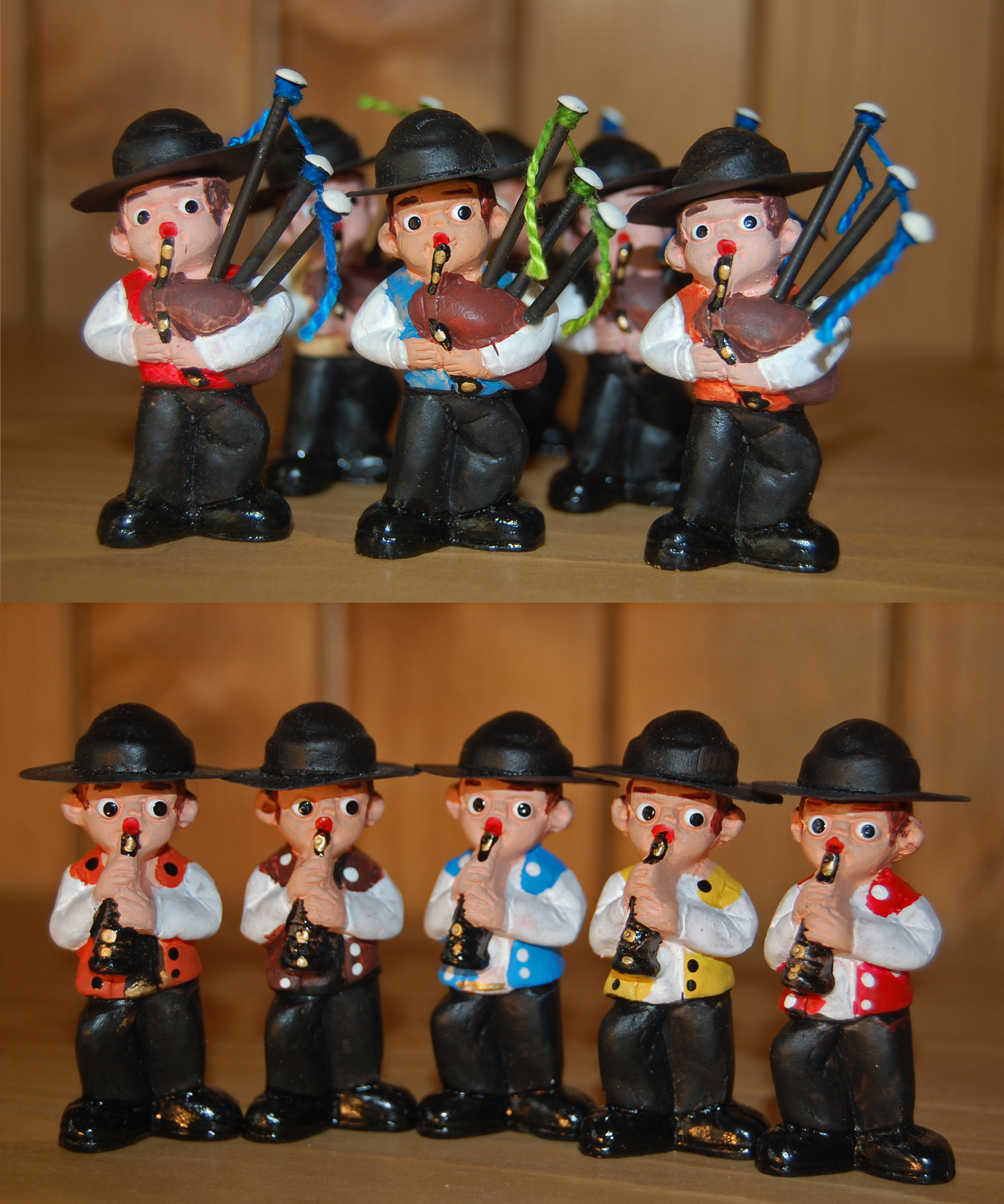 Figurines de sonneurs de biniou et de bombardes (conception des personnages, fabrication et photos de Pierre Josset).